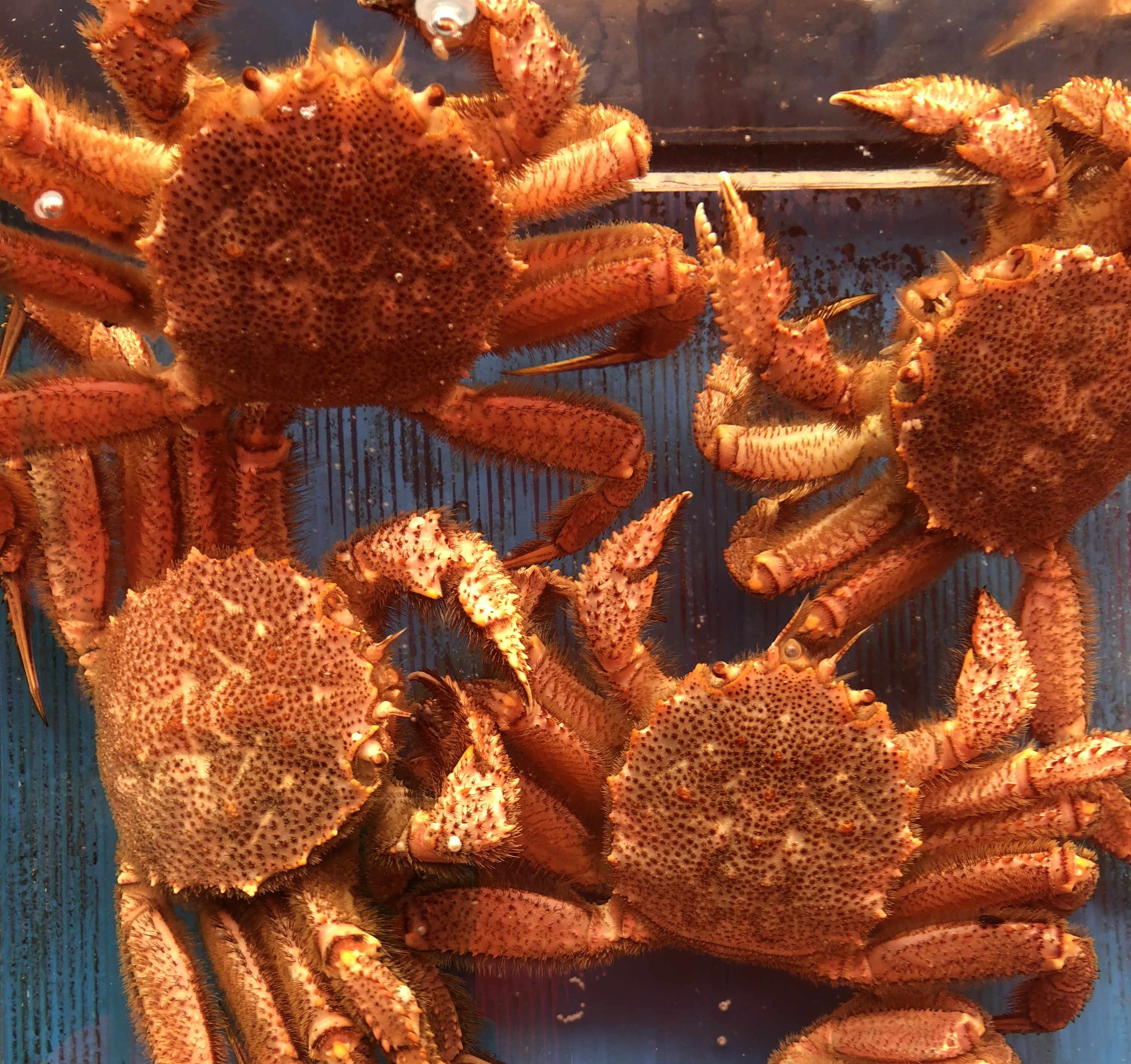 ケガニ、函館朝市のja:生け簀にて